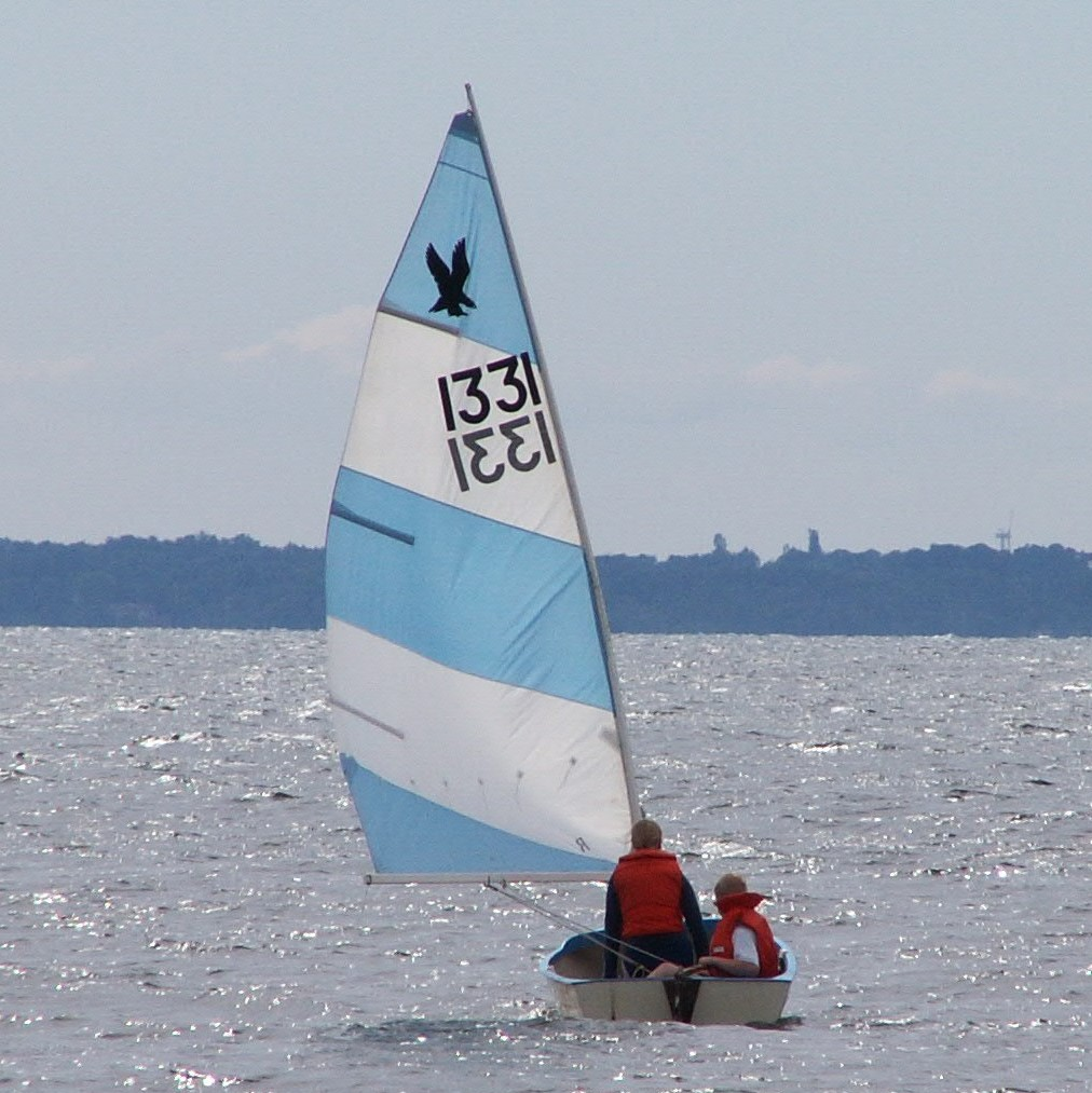 Örnjollen med segel